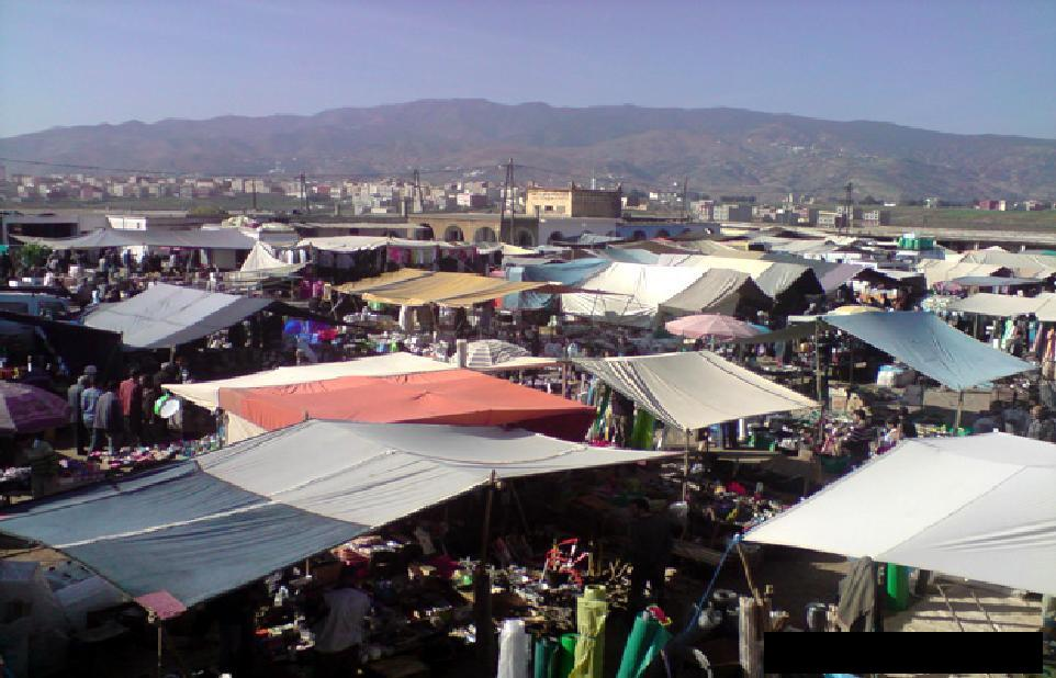 سوق تمسمان الأسبوعي